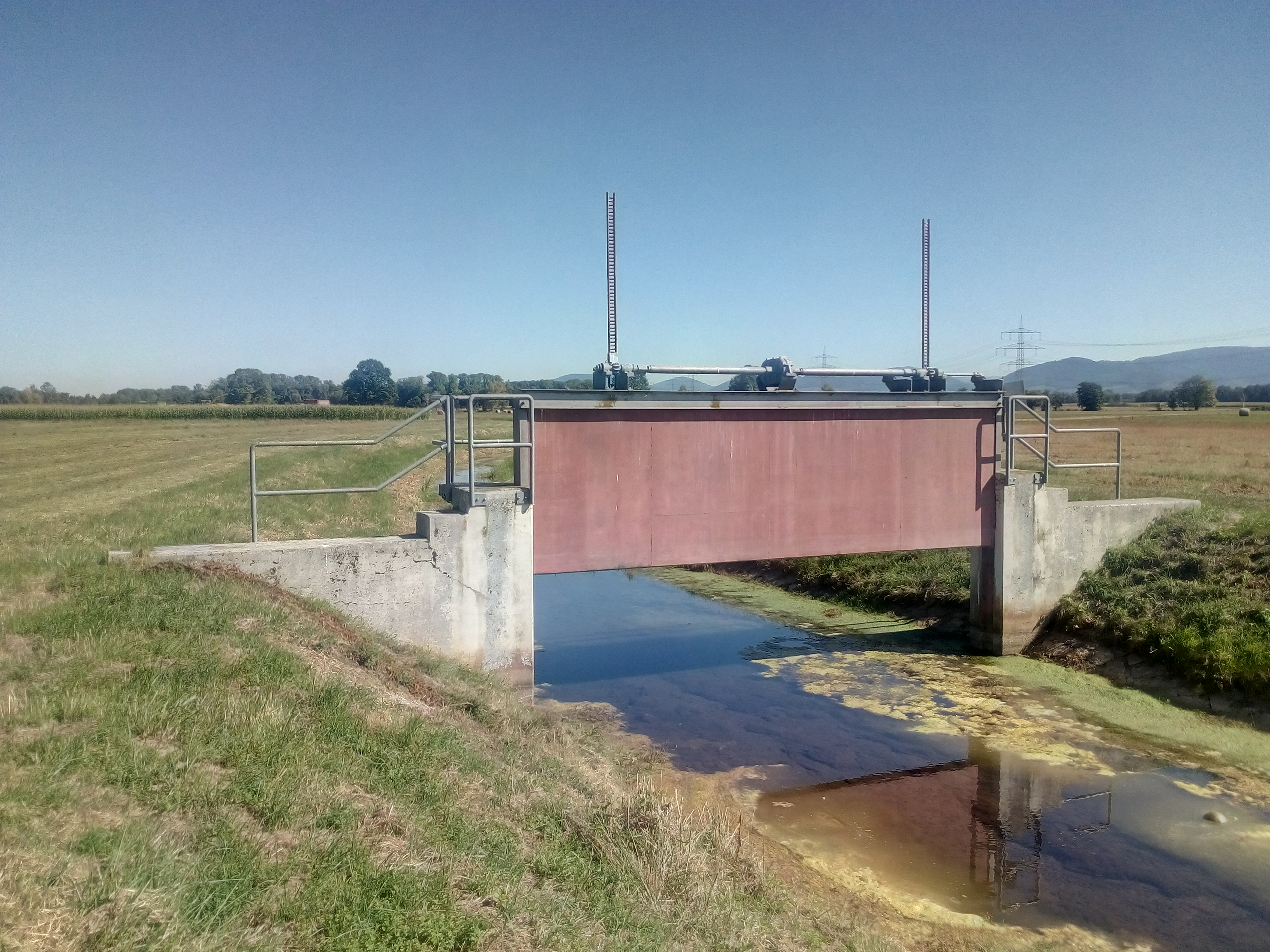 Stauwehr am Scheidgraben südlich von Bühl-Moos (liegt in einer Exklave der Gemeinde Sasbach)